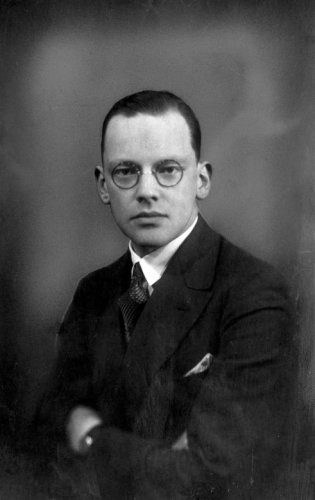 Menno ter Braak in zijn twintiger jaren